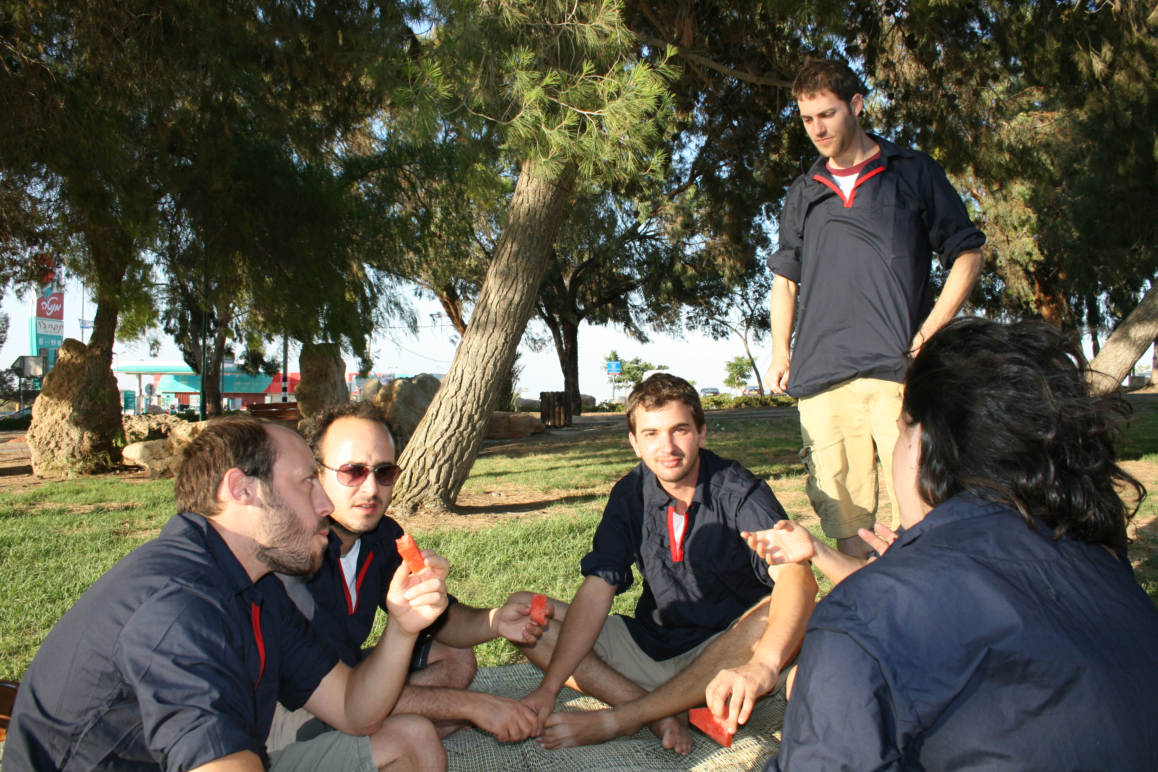 חברי תנועת דרור ישראל במפגש חברתי